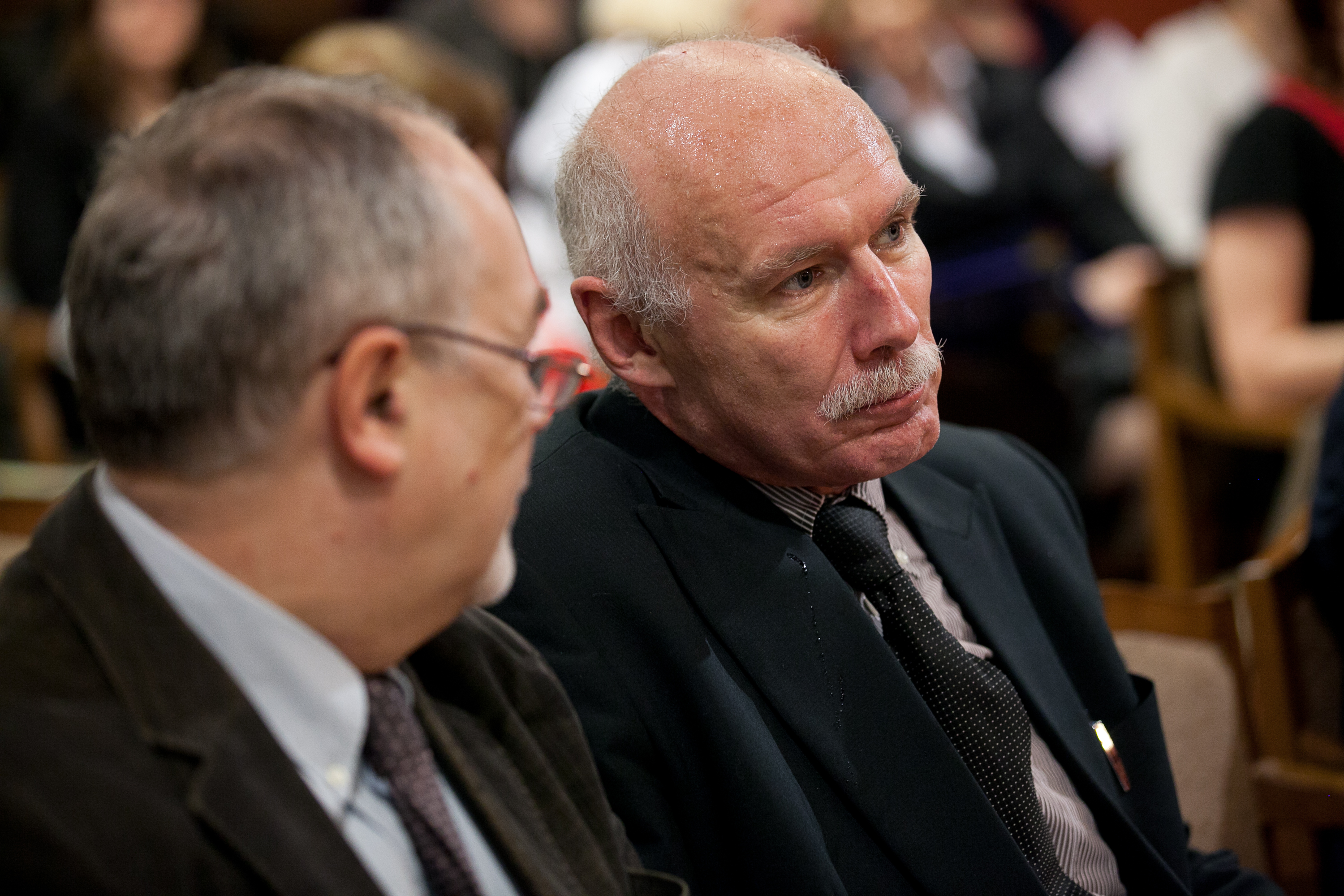 Pēteris Apinis; 2012.gada 13.aprīlis. Konference „Vesels un aktīvs Latvijā mūža garumā. Esošā situācija un nākotnes izaicinājumi.” Foto: Ernests Dinka, Saeimas Kanceleja